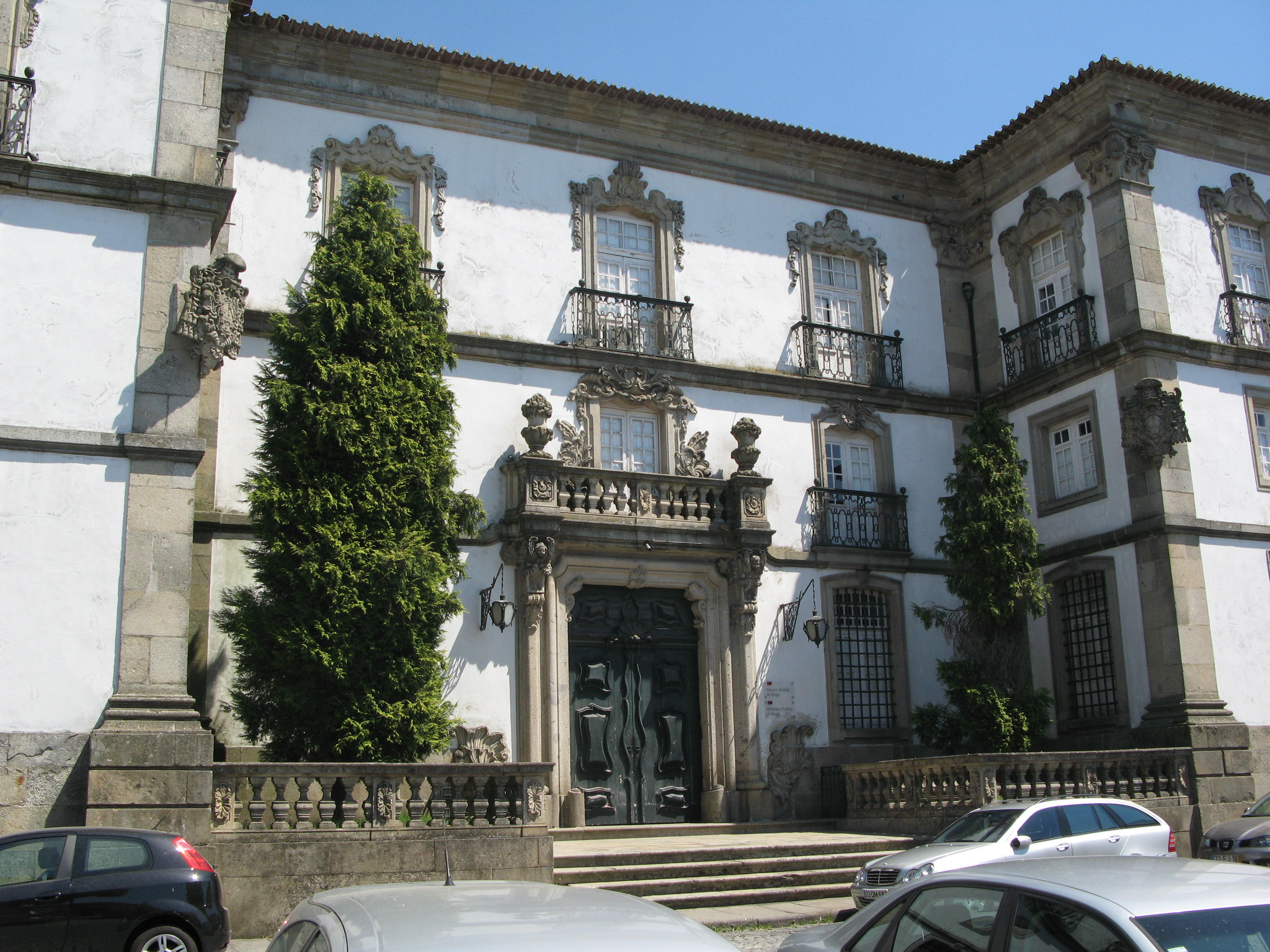 Biblioteca Pública de Braga, localizado na Praça do Município de Braga.